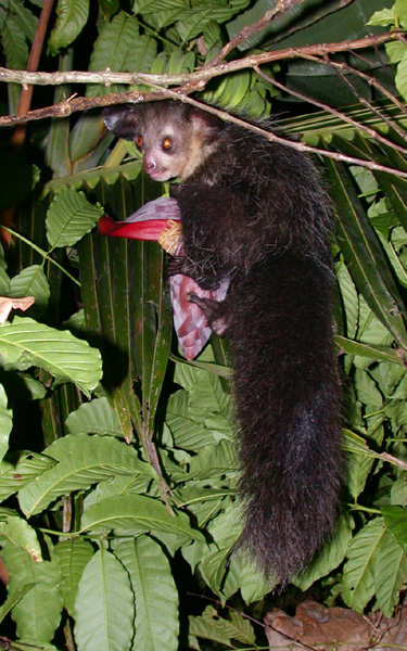 Aye-aye (Daubentonia madagascariensis)